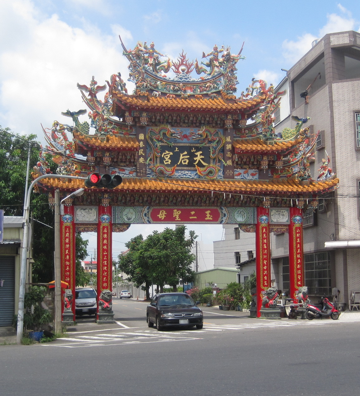 中文（台灣）: 山上天后宮牌樓